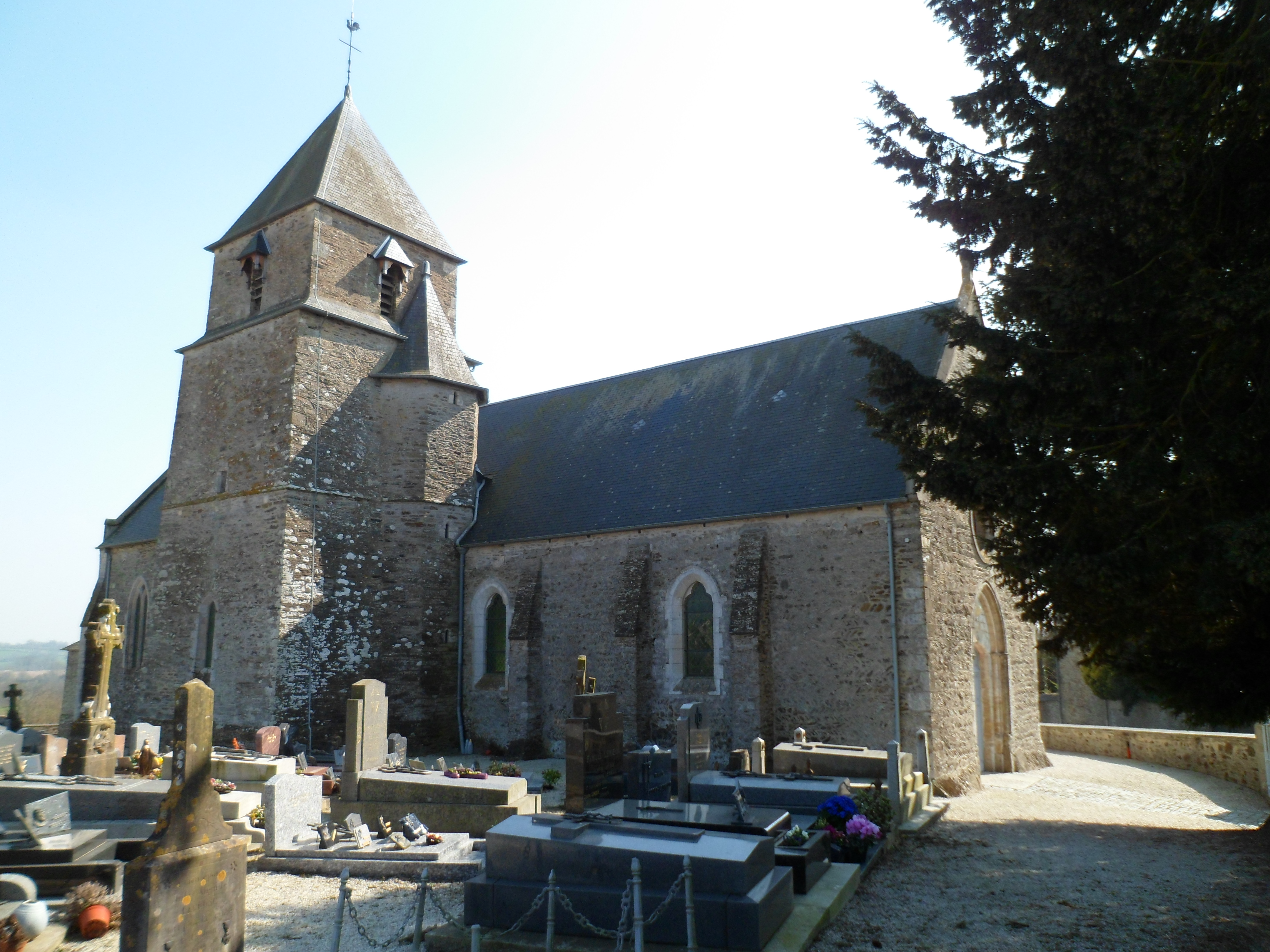 Église Saint-Ébremond de Saint-Ébremond-de-Bonfossé